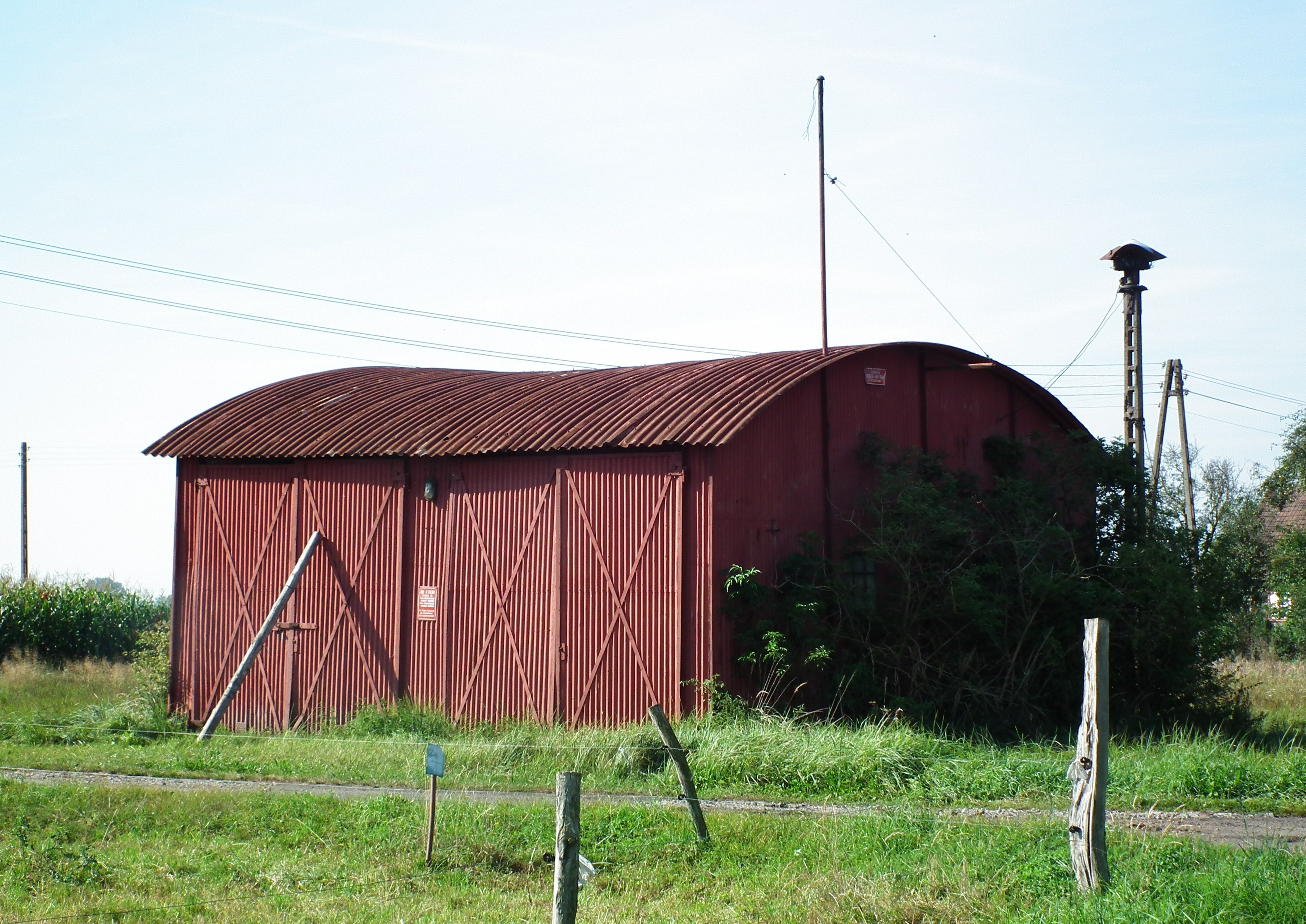 Remiza strażacka w Grodzisku (gm. Słońsk).